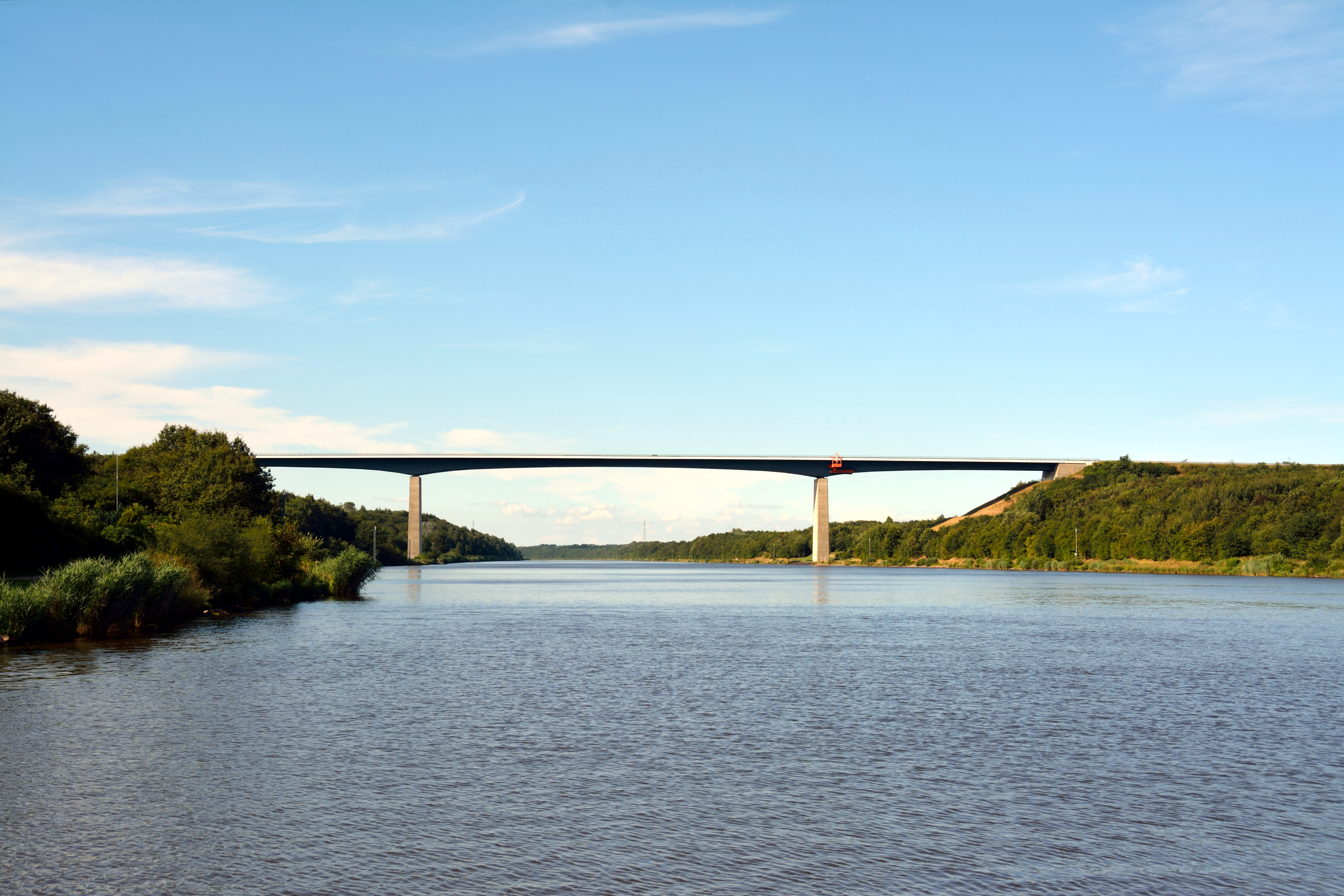 Am Fähranleger Hohenhörn